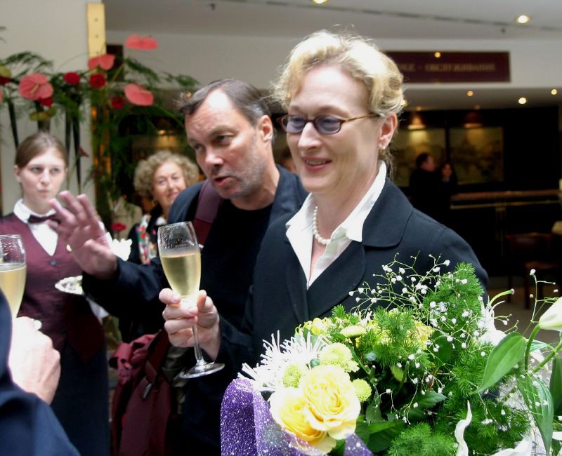 Meryl Streep in St-Petersburg, Russia